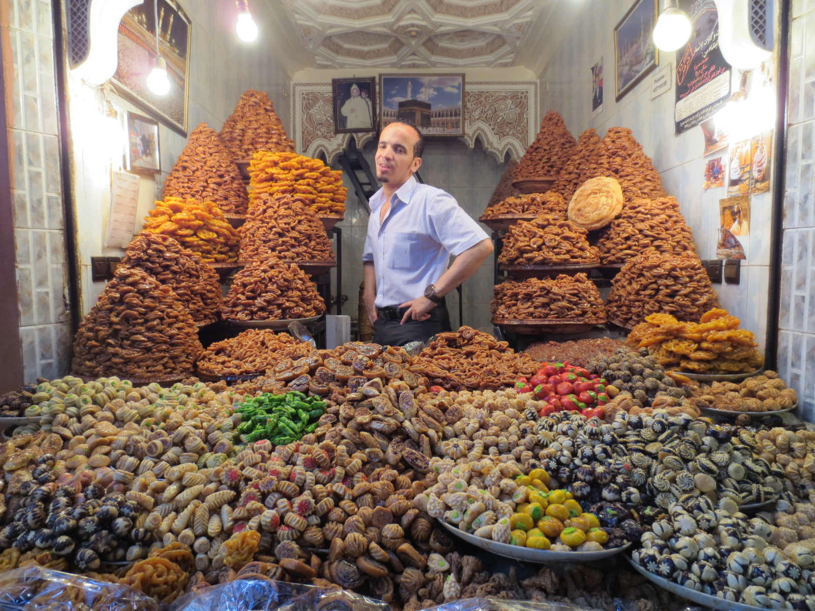 Pastries of Morocco, Souk de Marrakech au Maroc